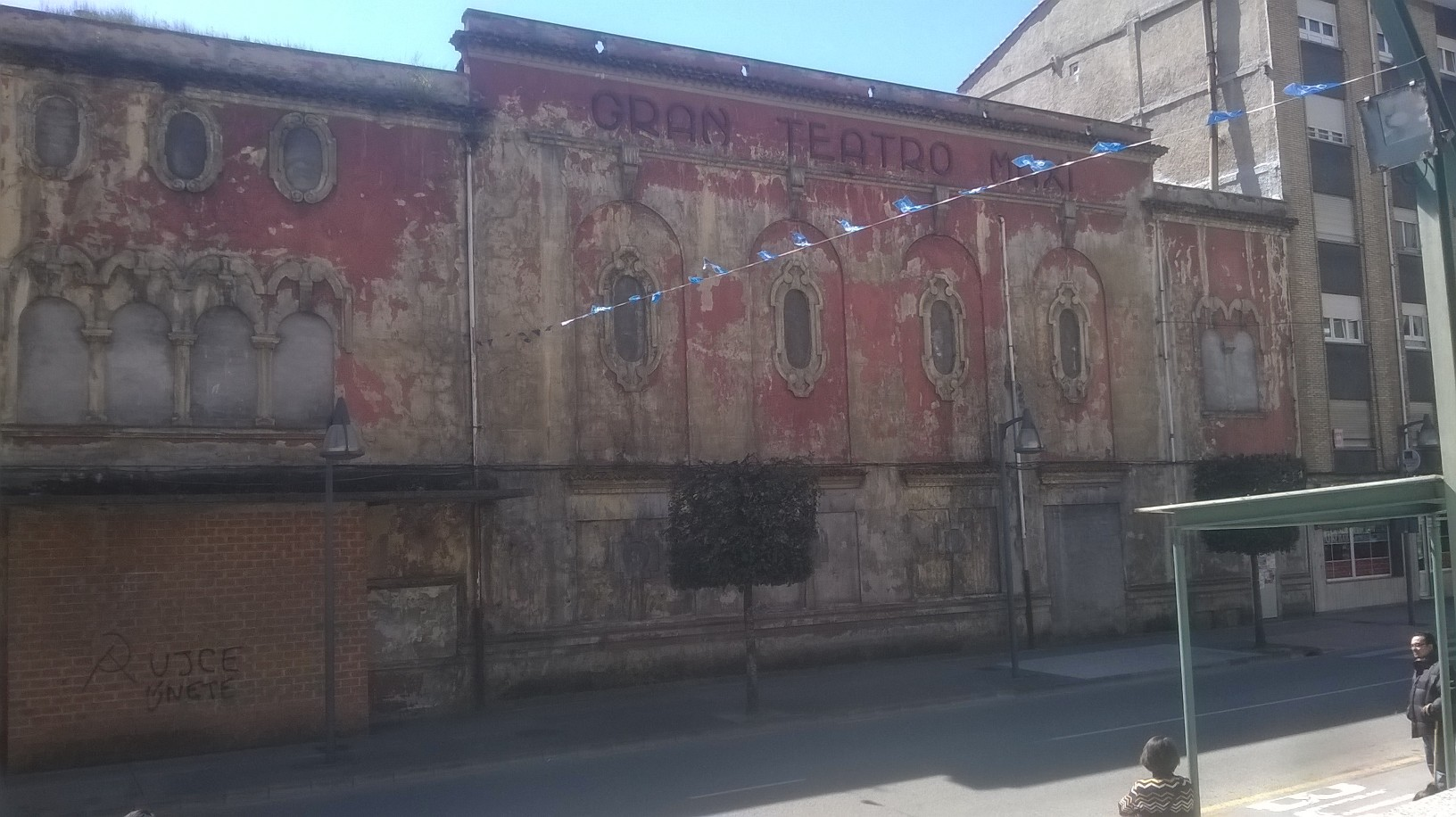 Fachada del Gran Teatro Maxi, en Pola de Laviana, Asturias, España, en mayo de 2016